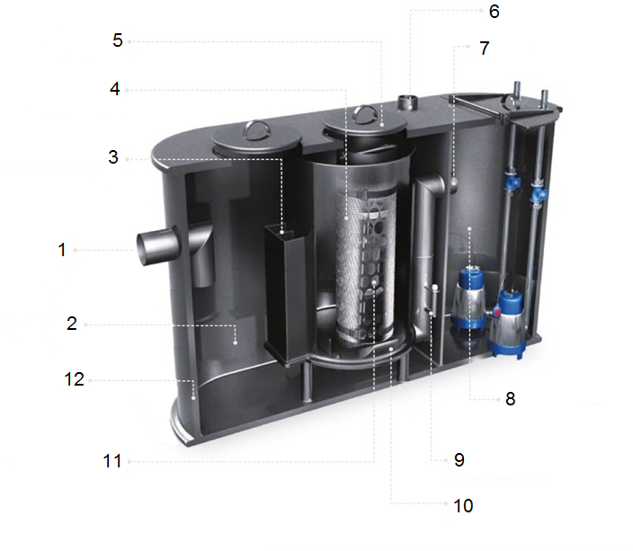 Šiame paveiksle vaizduojamas įrenginys yra su koalescencinių filtru, integruota nuosėdų talpykla ir siurblių kamera. 1 - įtekėjimo vamzdis; 2 - seperacinė kamera; 3 - seperacinės kameros anga; 4 - koalescensinis filtras; 5 - dangtis; 6 - vėdinimo anga; 7 - ištekėjimo anga; 8 - siurblių kamera. Joje montuojami siurbliai, skirti išvalytų nuotekų perpumpavimui į kanalizaciją arba vandens telkinį; 9 - mėginių ėmimo prietaiso prijungimo atvamzdis; 10 – sifoninis išleidimo angos kanalas. Čia apvalytos nuotekos nuteka iš seperatoriaus per sifoninę išleidimo angą, kurioje yra uždarantis plūduras; 11 - išleidimo angos uždarymo plūduras. Pasiekus maksimalią naftos produktų kaupimo ribą (riba skirtinguose skirtuvuose skirtinga) plūduras uždaro atskirtuvo išleidimo angą. Tai užkerta kelią kanalizacijos arba kitų telkinių užteršimui naftos produktais; 12 - talpykla.